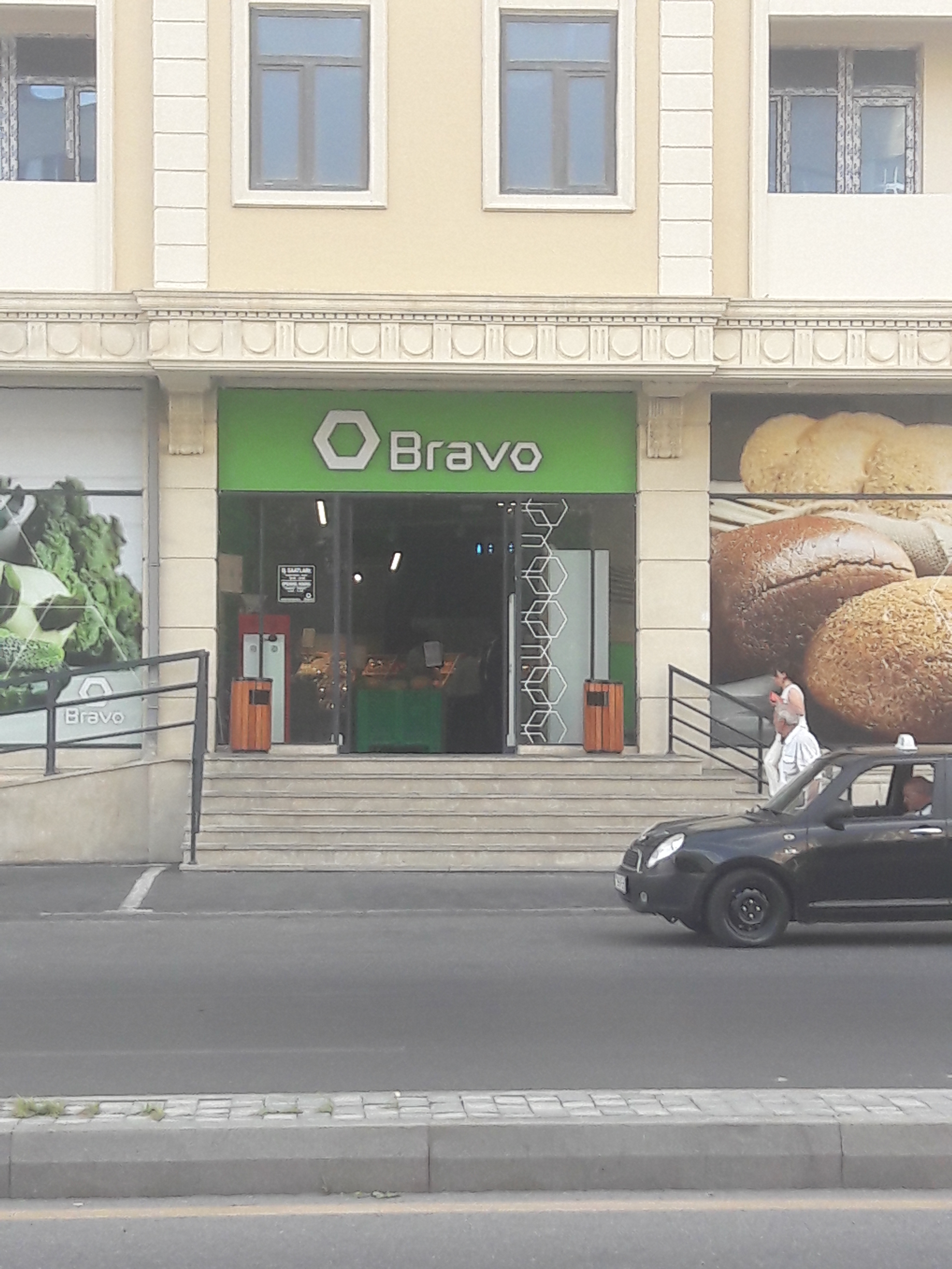 Şərifzadədə Bravo - 2018